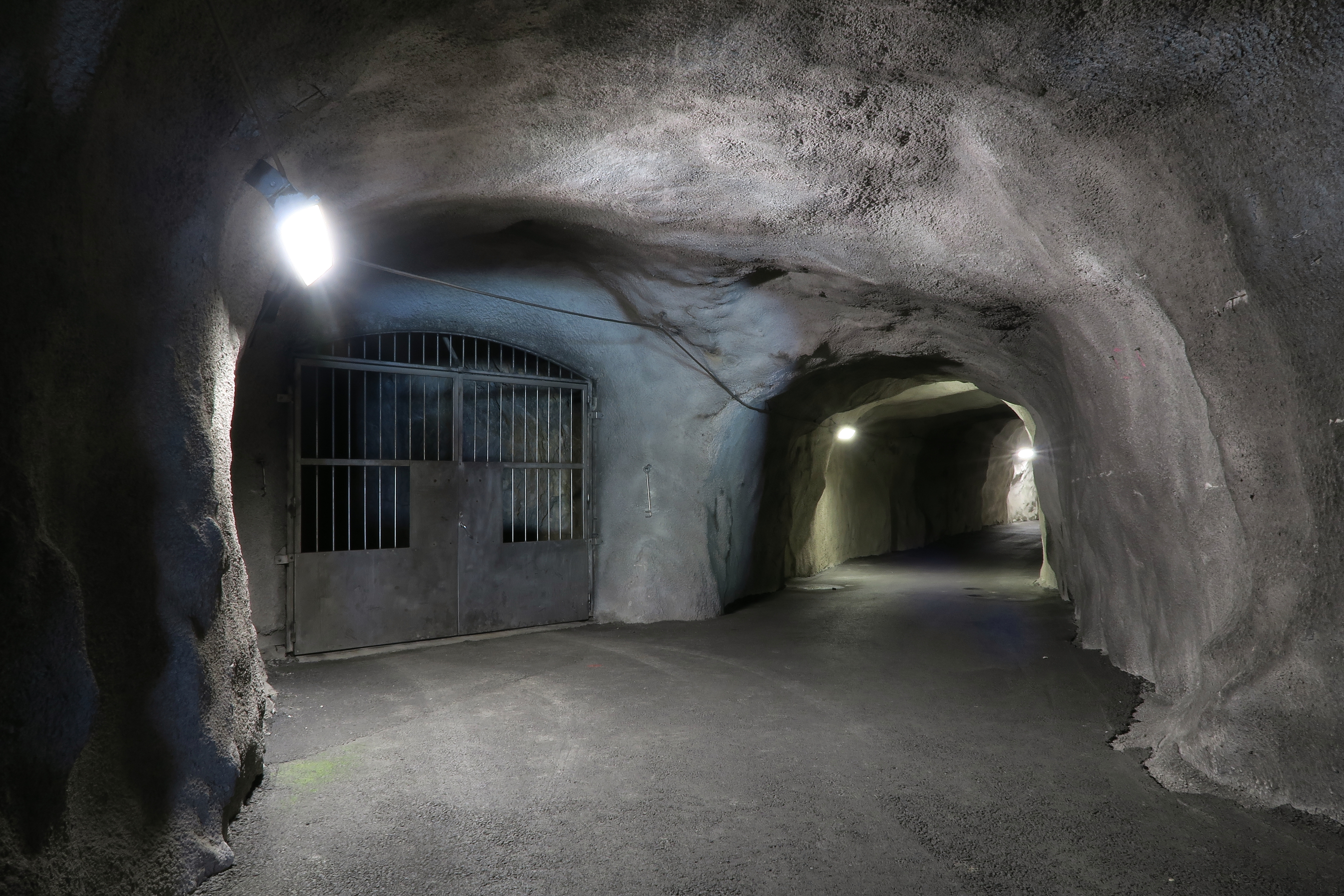 Velotunnel Standenhorn und SBB-Fluchttunnel Sallernstollen